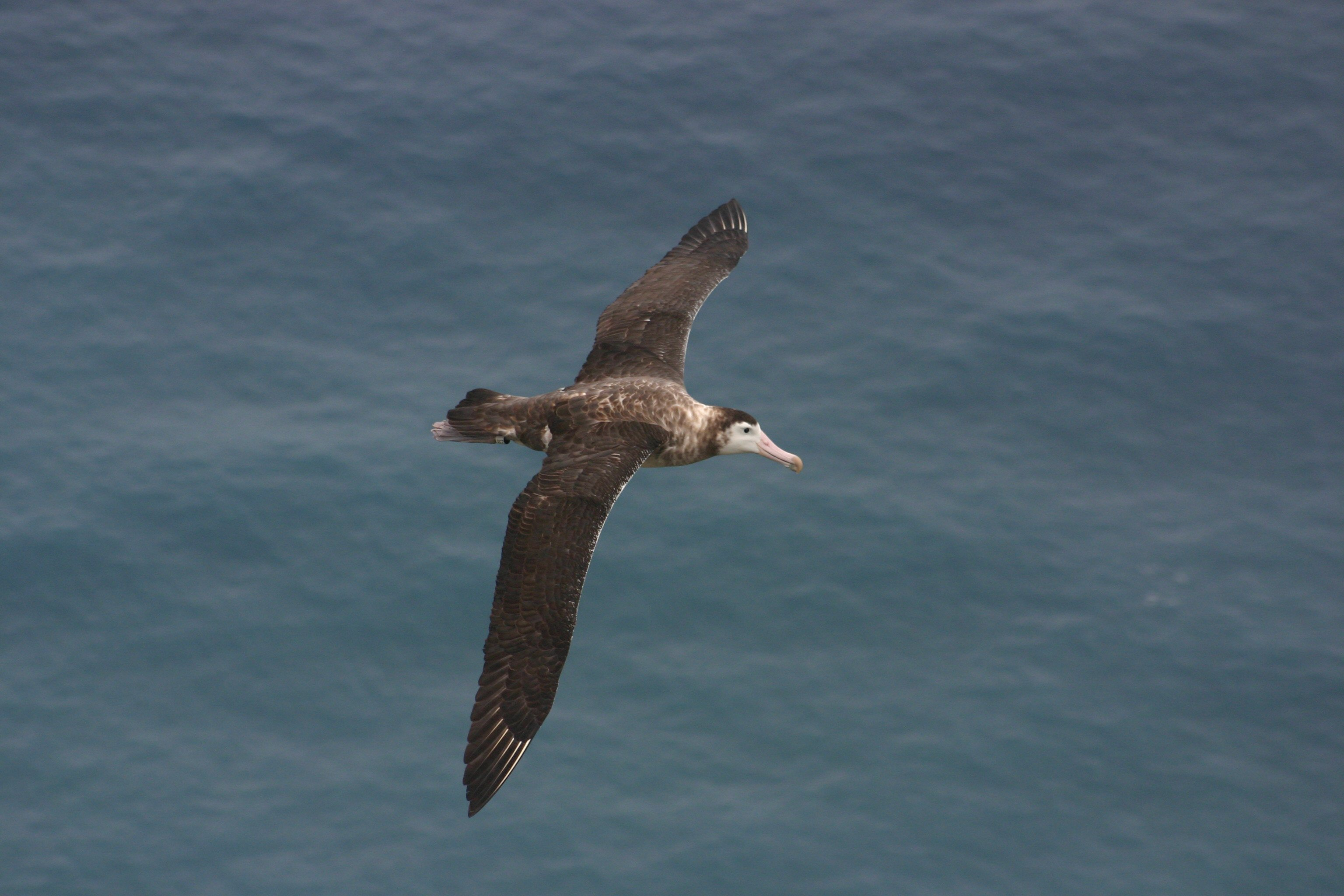 Albatros d'amsterdam